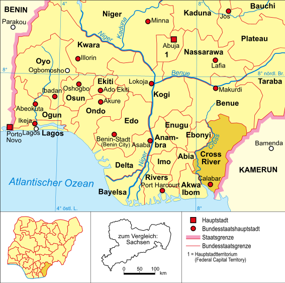 Politische Karte Nigerias (Bundesstaat Cross River hervorgehoben)